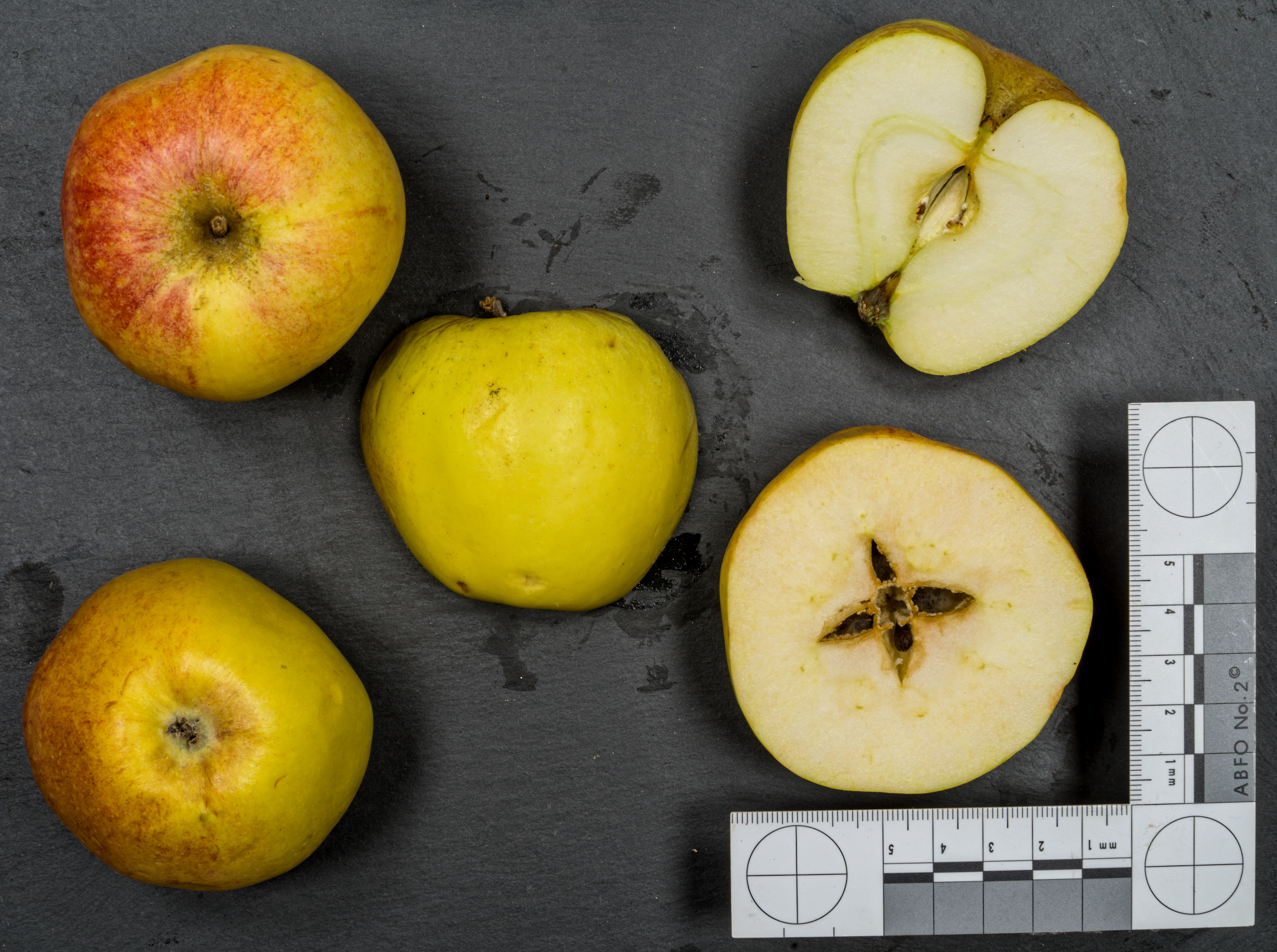 Apfelsorte: Finkenwerder Herbstprinz, Finkenwerder, Finkenwerder Prinz, Finkenwerder Prinzenapfel, Hasenkopf, Herbstprinz 18. Jahrhundert Norddeutschland Vielen Dank an den Herzapfelhof Lühs in Jork, Altes Land, Deutschland für die freundliche Unterstützung